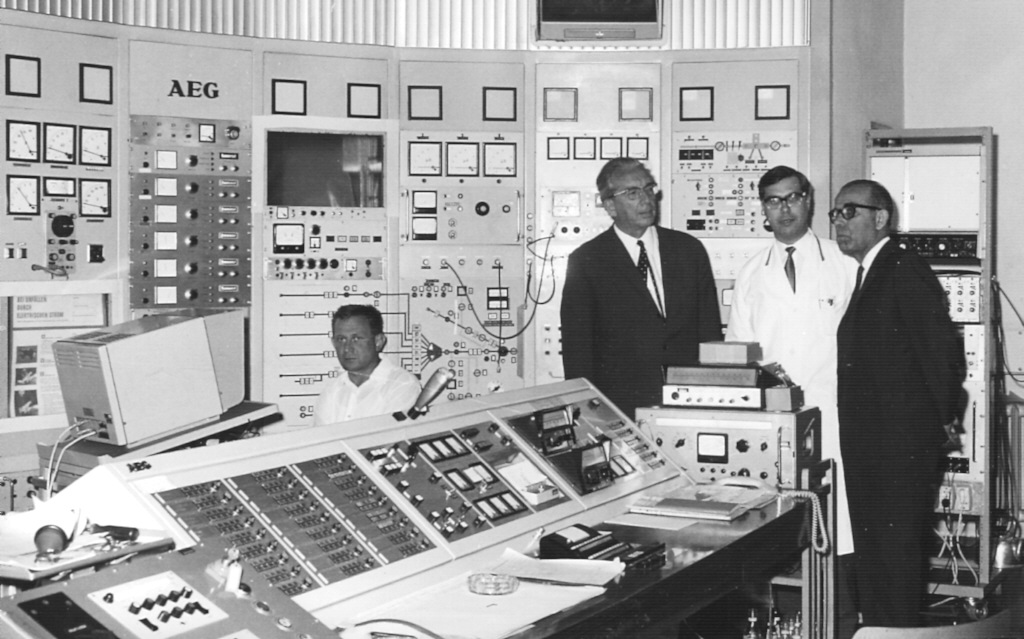 Victorio Angelelli en Karlsruhe, visitando laboratorios de la Comisión Nuclear de Alemania.